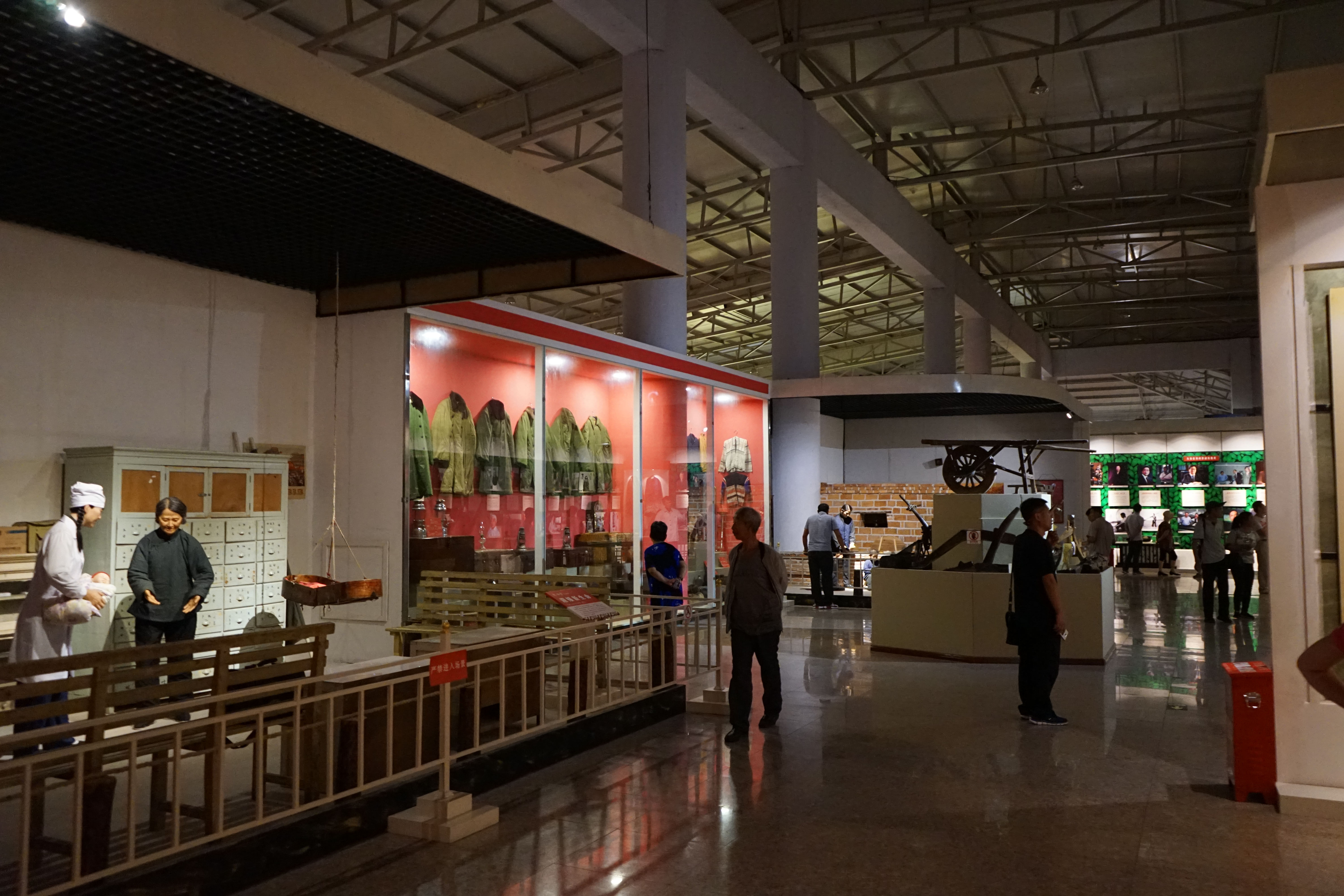 黑河博物馆展厅内景